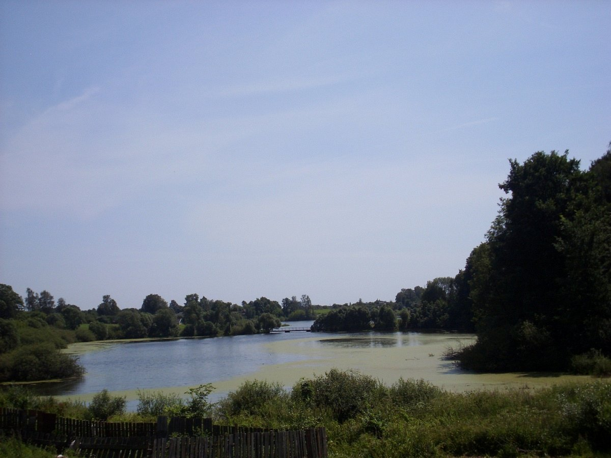 Межава. Сядзібна-паркавы ансамбль Любенскіх